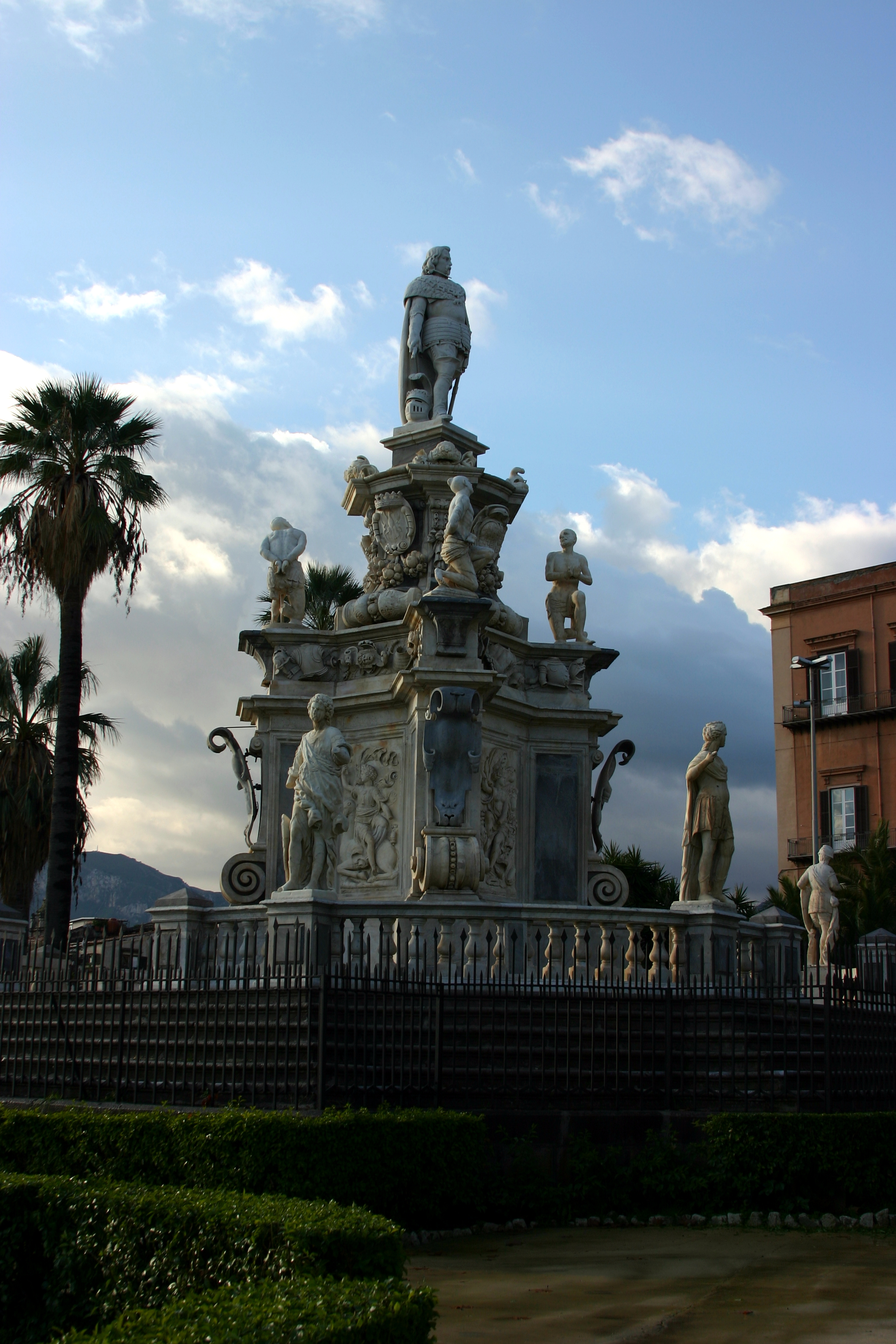 Monument to Philip V - Palermo